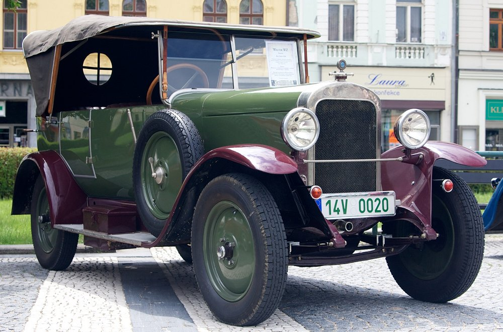 Walter WZ (1920)